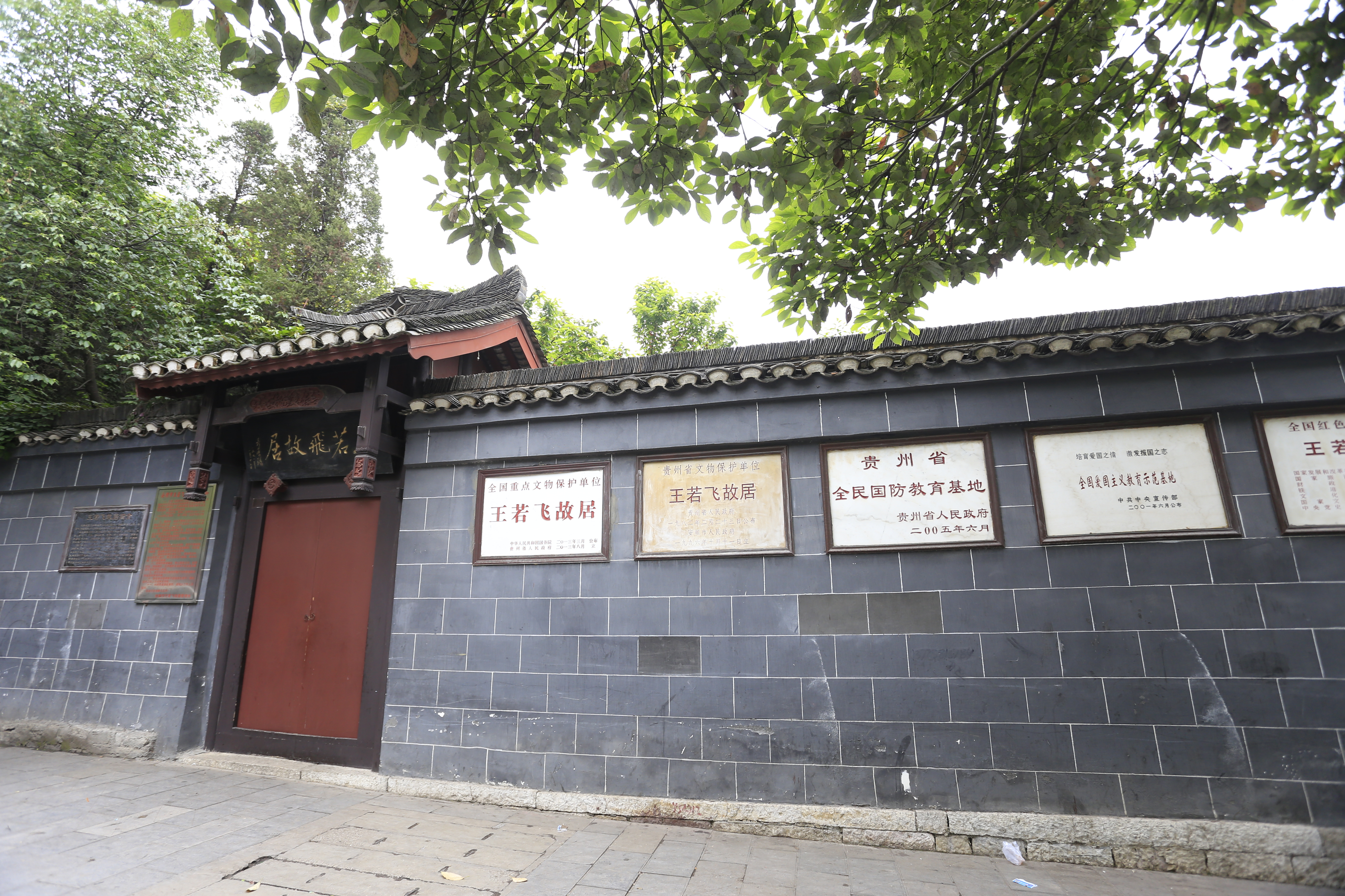 王若飞故居